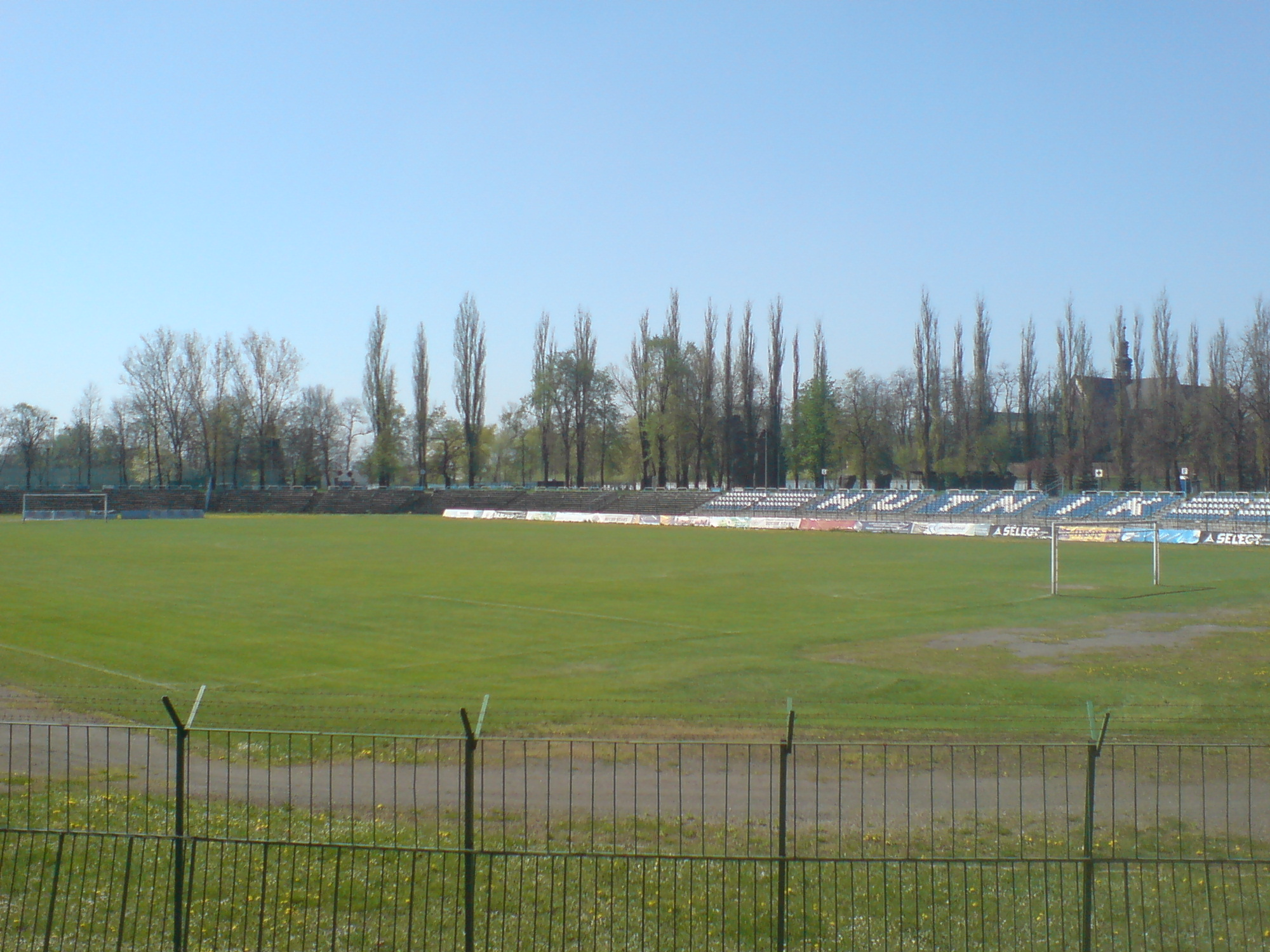 Stadion Hutnika Kraków